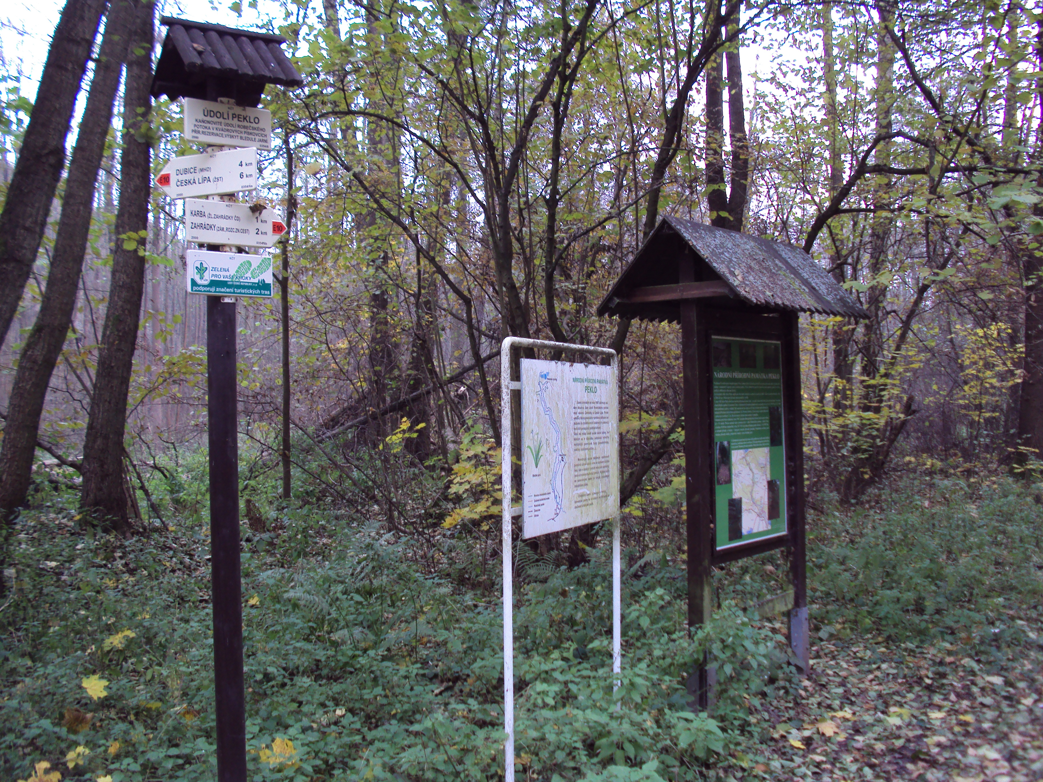 Rozcestník v rezervaci Peklo, na vstupu od Zahrádek